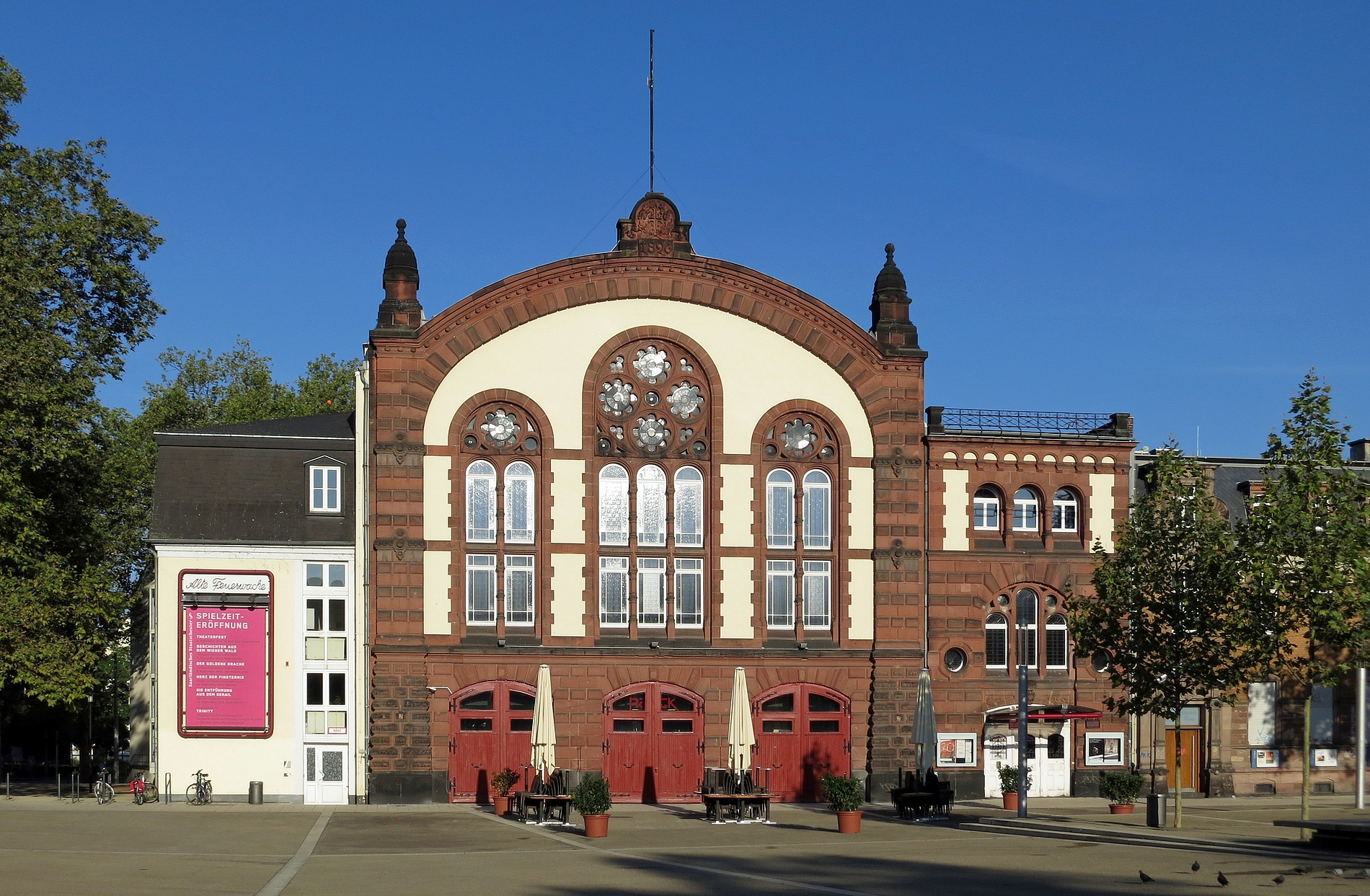 Theater Alte Feuerwache, Saarbrücken.